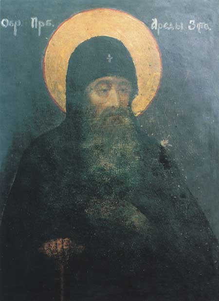 Арефа затвірник - ?- бл. 1195 р. (Saint Arethas / Arefa the Recluse of Kyiv Caves) Чернець Печерського монастиря. Преподобний. Пам'ять 11 жовтня і 6 листопада. Народився в Полоцьку. Відзначився жадністю і скнарістю. Але після того, як був пограбований і тяжко захворів, покаявся і зрікся від багатства. Вже будучи ченцем Печерського монастиря, прп.Арефа зовсім змінив спосіб життя: зробився милостивий і лагідний, роздав своє майно вбогим і провів залишок днів у затворі. Преставився близько 1195 р. Його мощі спочивають у Ближніх печерах.